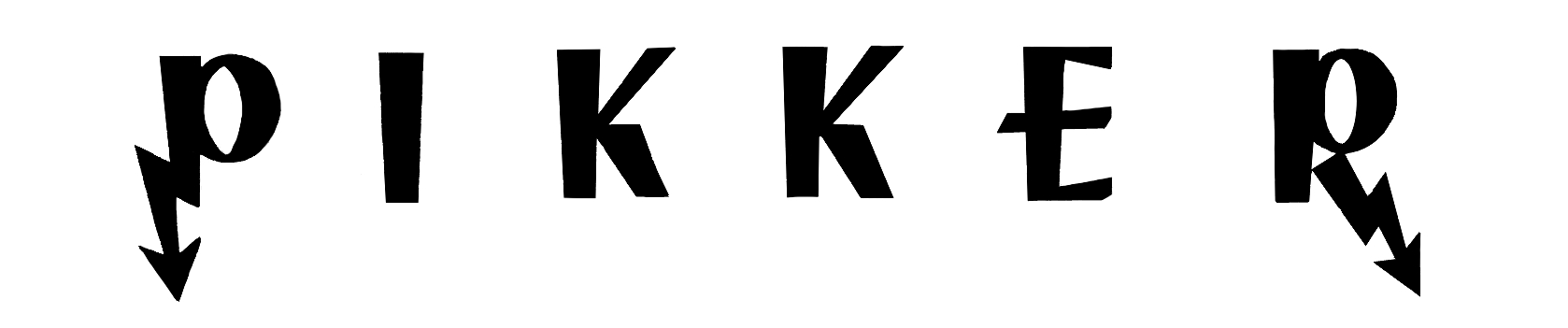 Ajakiri Pikker päis alates 1945 aastast